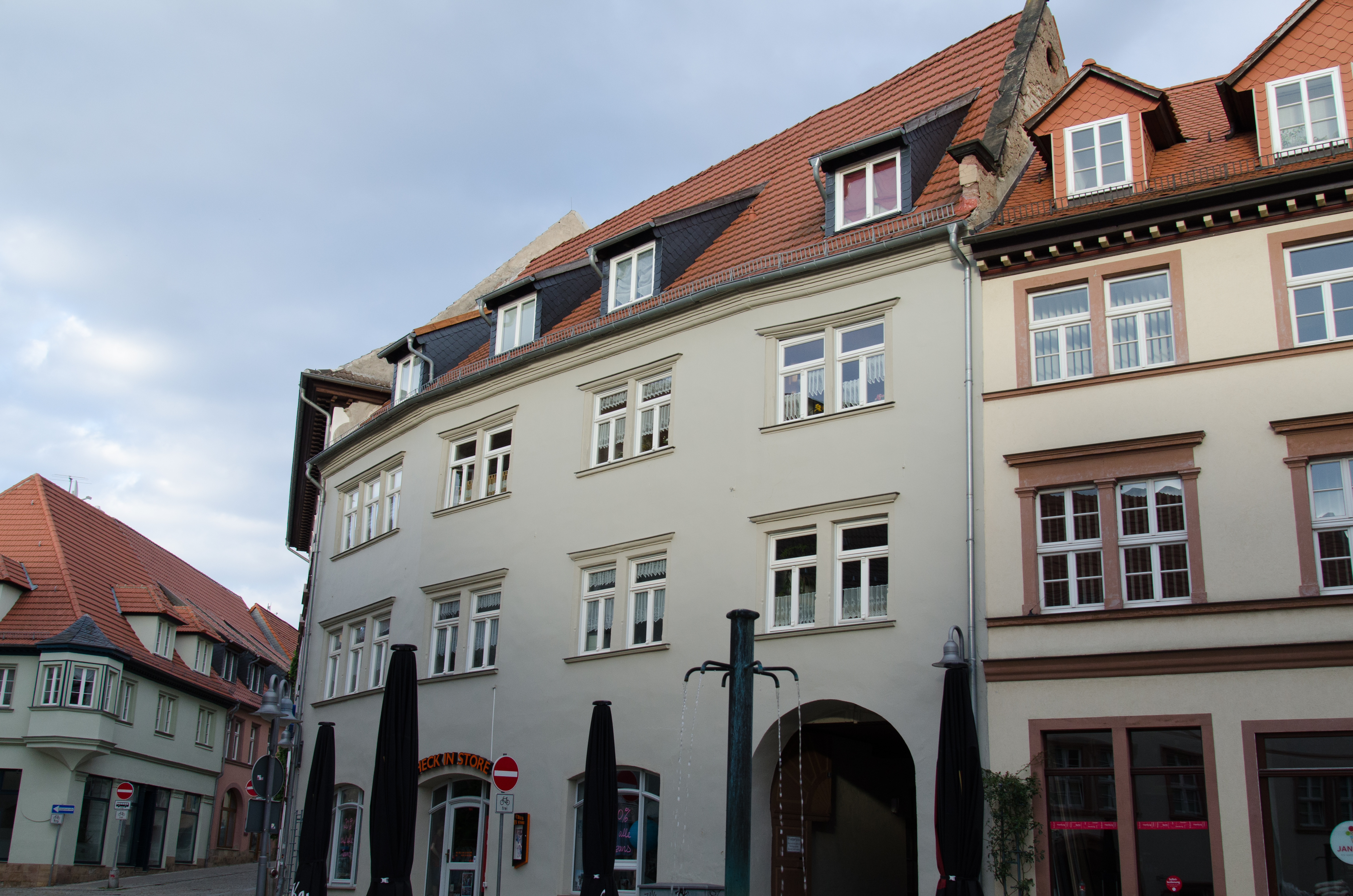 Sangerhausen, Kornmarkt 8